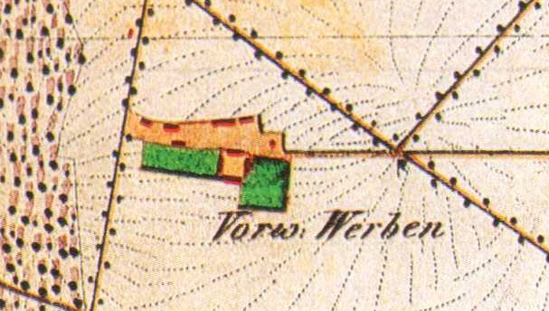 Werben, Gemeindeteil von Glienick, einem Ortsteil der Stadt Zossen, Brandenburg, Deutschland, Ausschnitt aus dem Urmesstischblatt von 1840, Blatt Zossen 3749